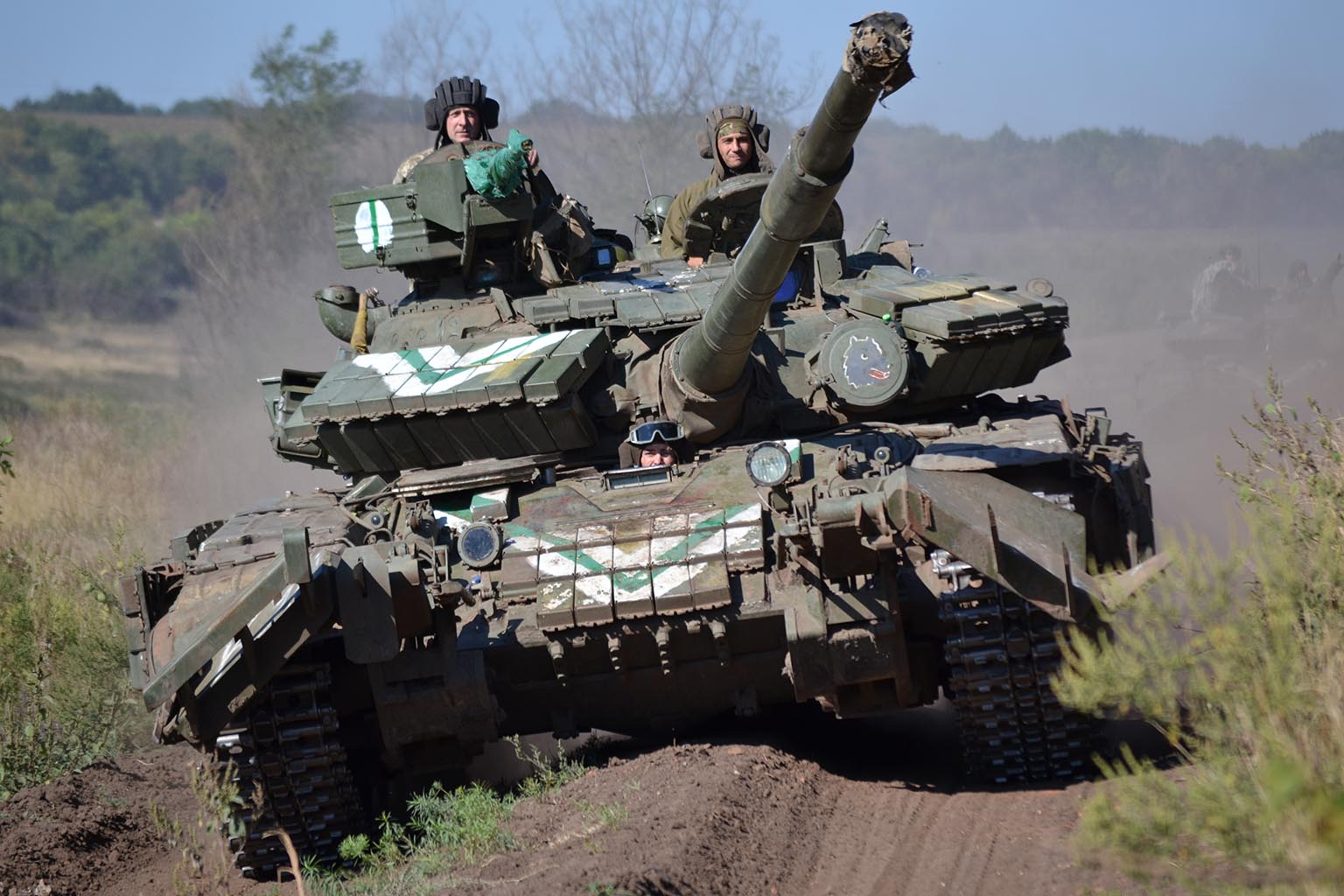 У День танкістів військовослужбовці окремого танкового батальйону «Звіробій»", який виконує завдання із захисту Батьківщини, в районі АТО, провели практичні заняття з бойової підготовки. Командир батальйону майор Анатолій Самбрас підкреслив, що попри свято, за планом бойової підготовки визначені екіпажі танків Т-64 провели тренування бойової готовності. — Батальйон перебуває в районі відведення, але постійно знаходиться у стані бойової готовності. Сьогоднішні тренування — наша звичайна щоденна робота попри будні чи свята. Підтримання високого стану бойової готовності досягається постійними тренуваннями і вдосконаленням майстерності та натренованості особового складу, — наголосив комбат. На урочистому шикуванні батальйону офіцери вищих штабів вручили воїнам-танкістам погони з черговими військовими званнями, медалі, відзнаки, грамоти й подяки. Автор фото: Андрій Агєєв